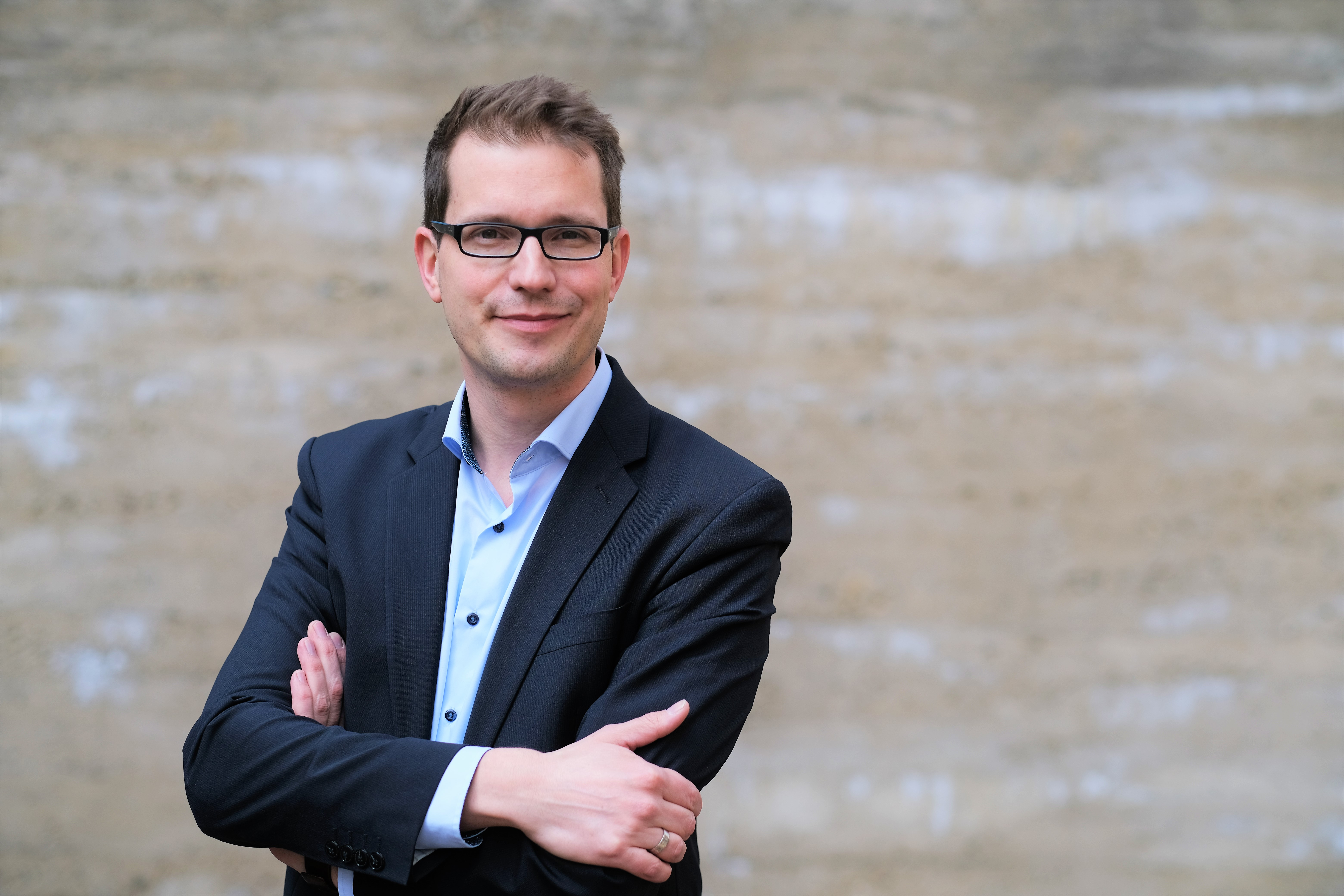 Portrait von Alexander Trennheuser